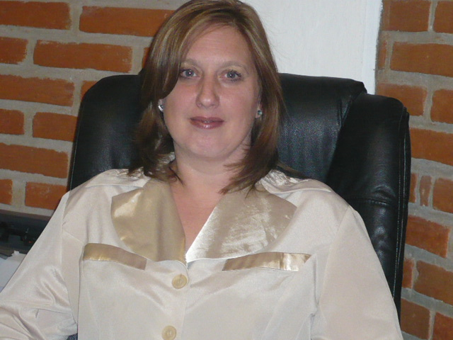 Dra. Laura A. Albarellos